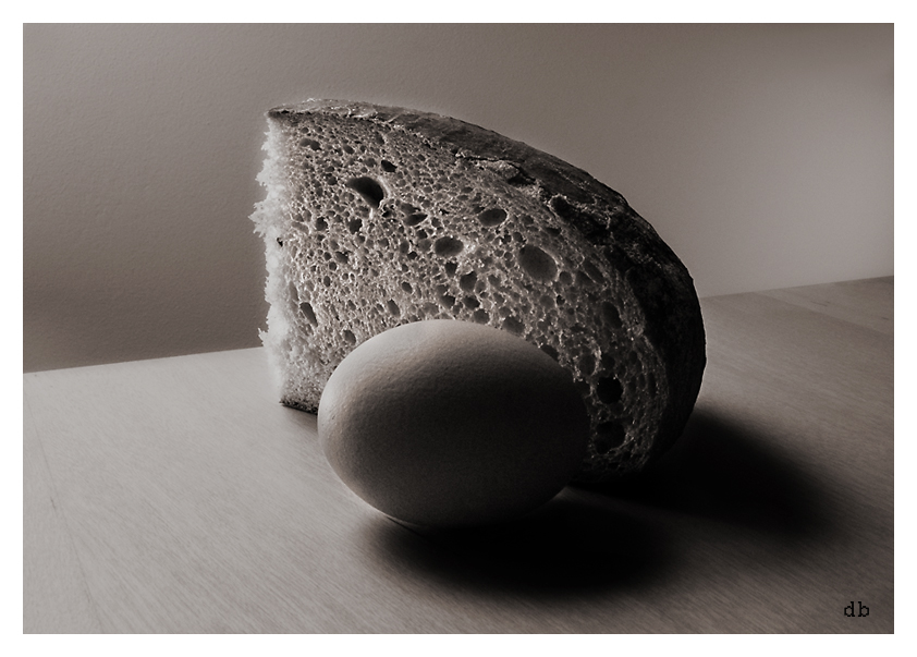 Inspirace Josefem Sudkem ...a´la Josef Sudek